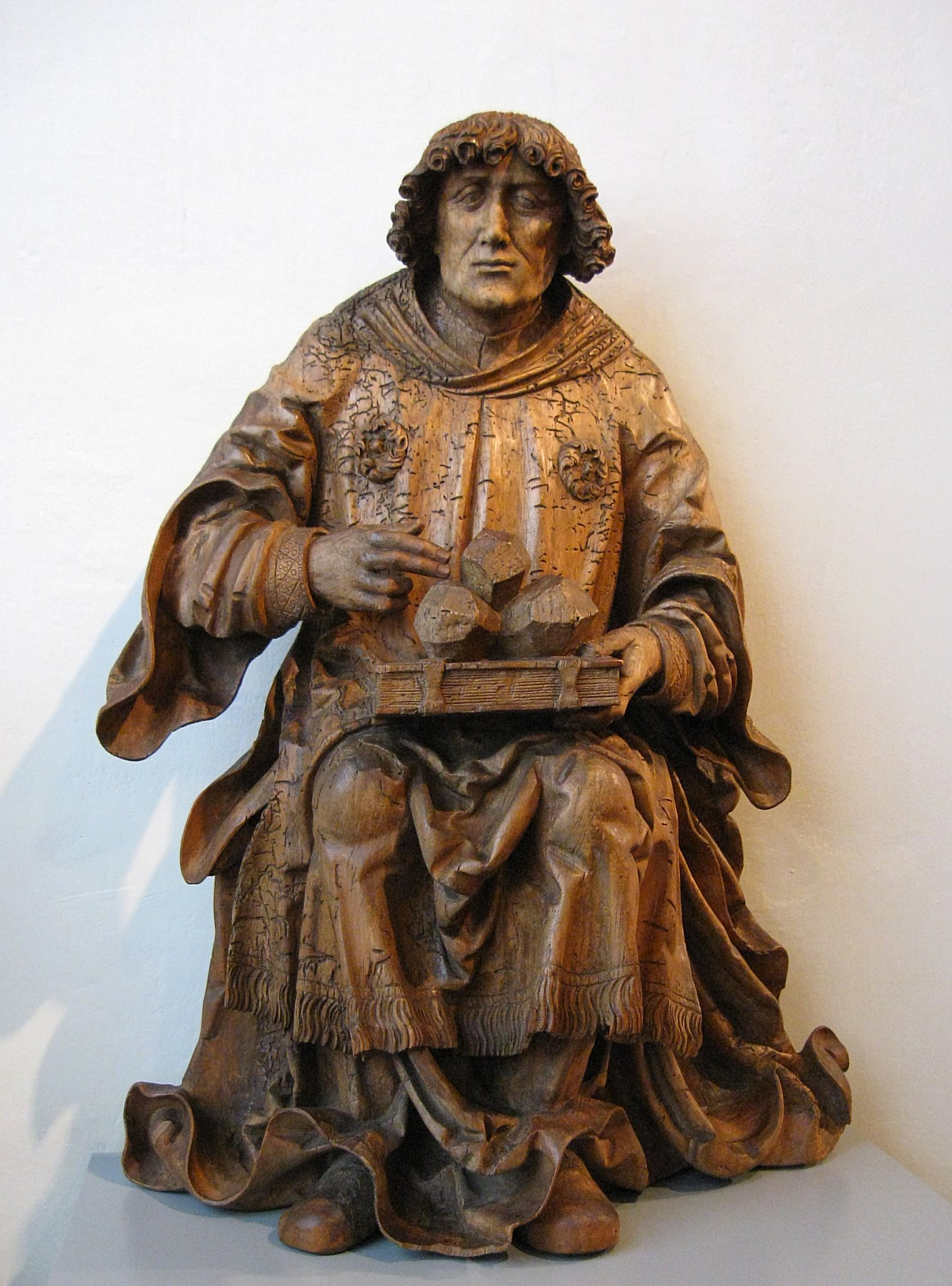 Meister der Altöttinger Türen: Hl. Stephanus, um 1520-30, Laubholz, Fassung entfernt, Bayerisches Nationalmuseum in München